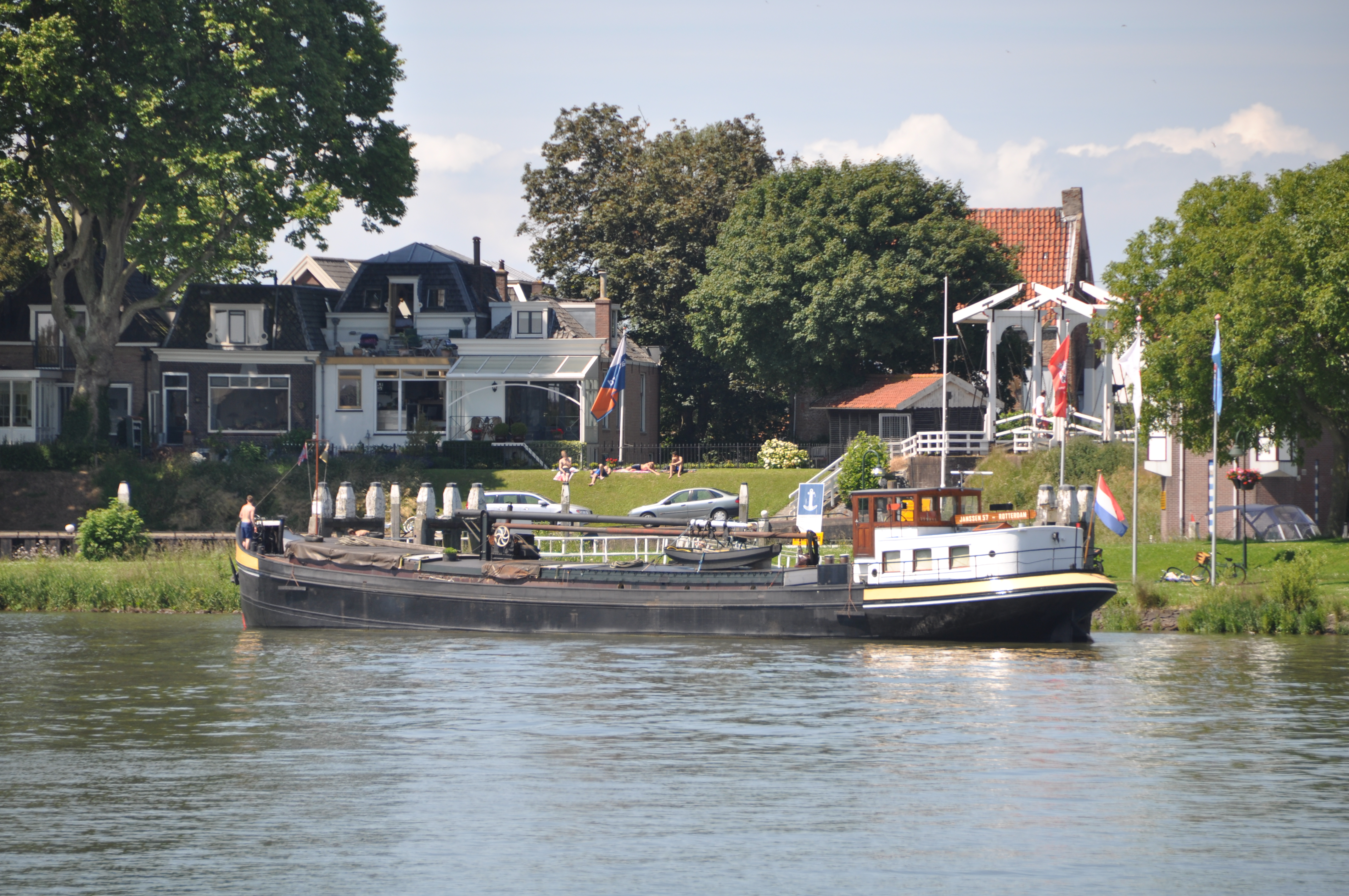 De JANSSEN 57 voor de wal in Schoonhoven.